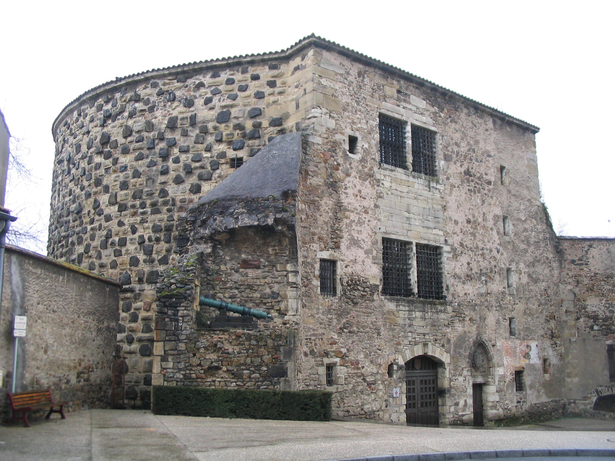 La Tour Prisonnière à Cusset(France). Dernier vestige des fortifications de la ville, elle a servi de prison durant longtemps.